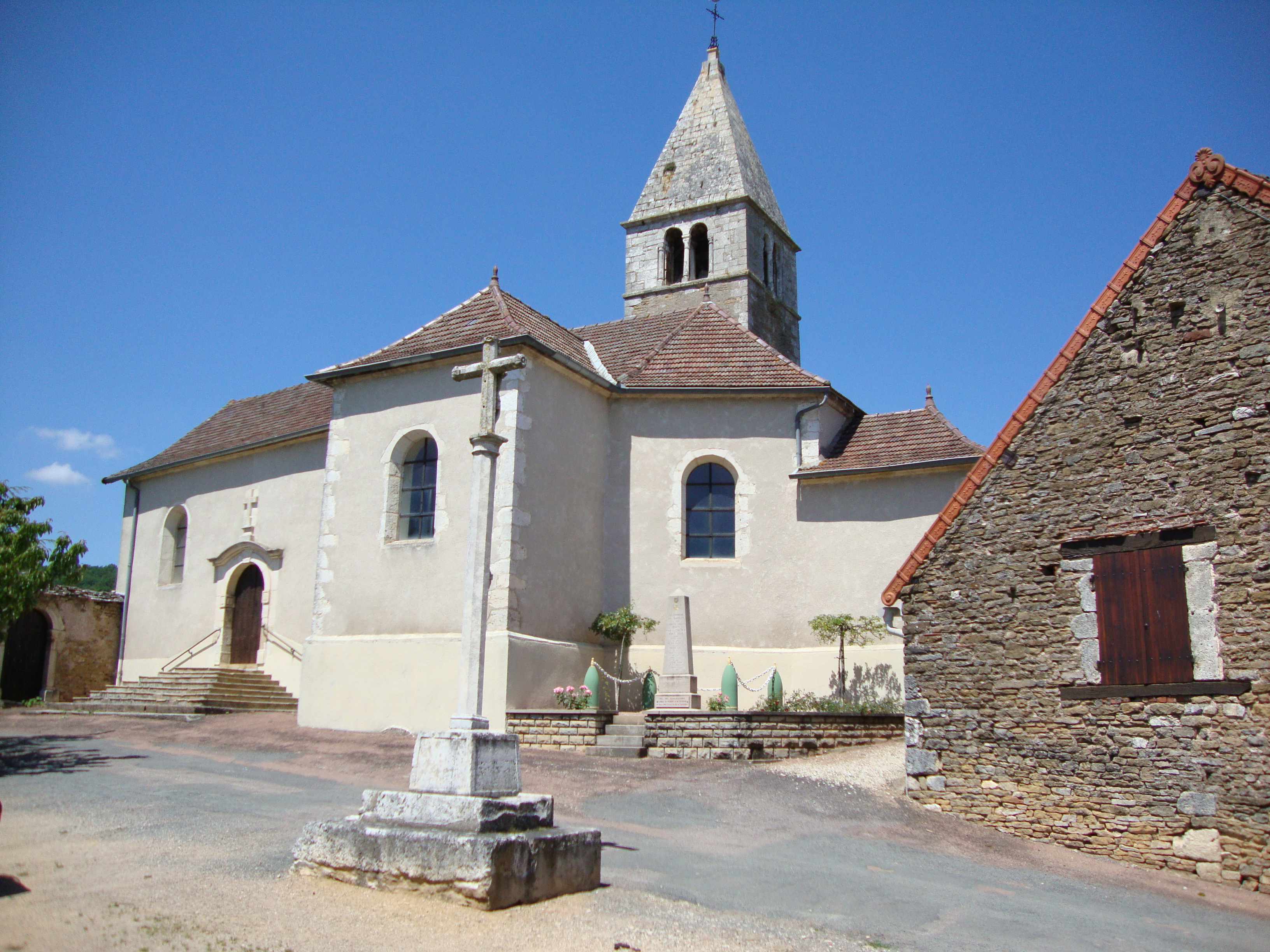 Saules (Saône-et-Loire, Fr) église, calvaire, monument aux morts